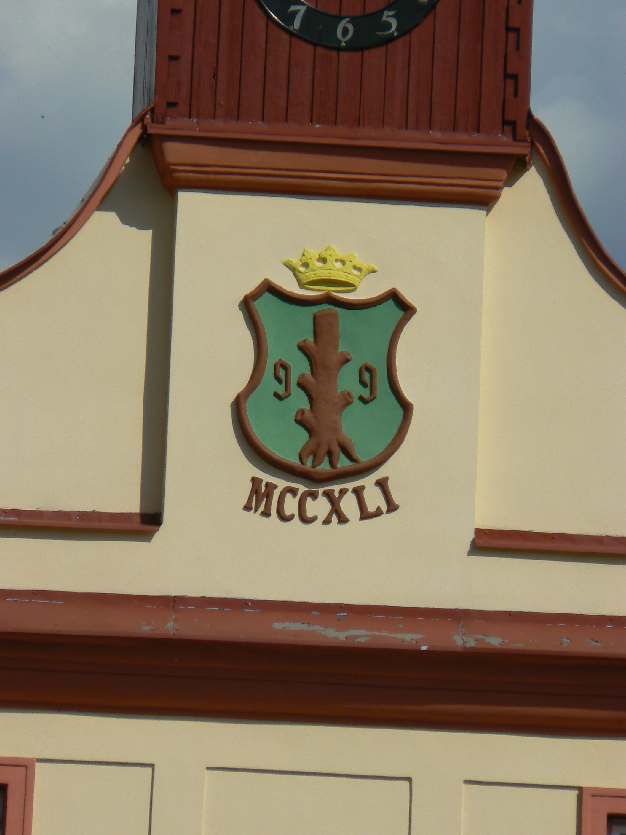 znak na radnici nacházející se na náměstí TGM